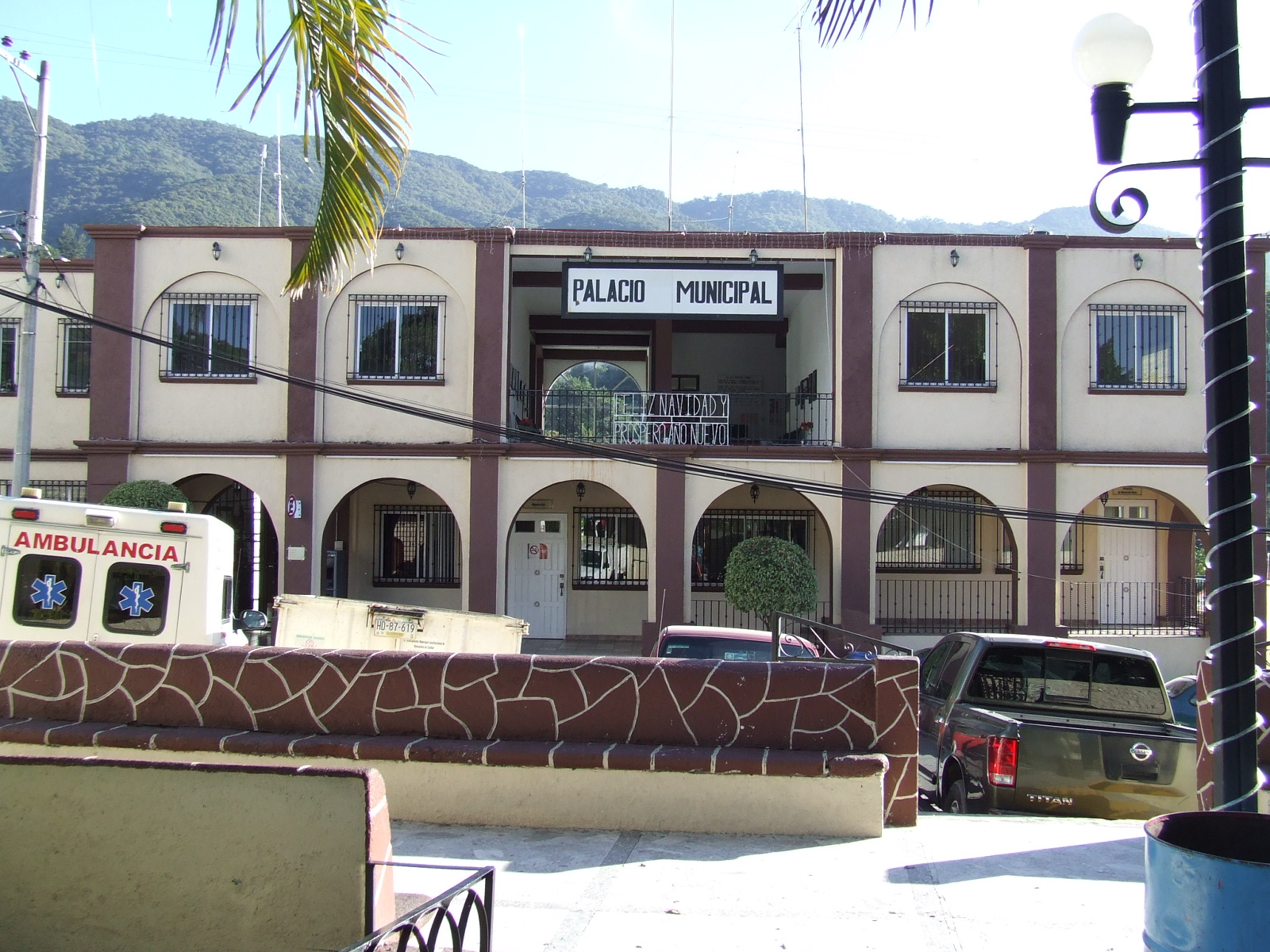 Edificio del Ayuntamiento de Buenavista de Cuéllar.